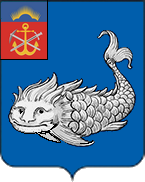 Герб Колы